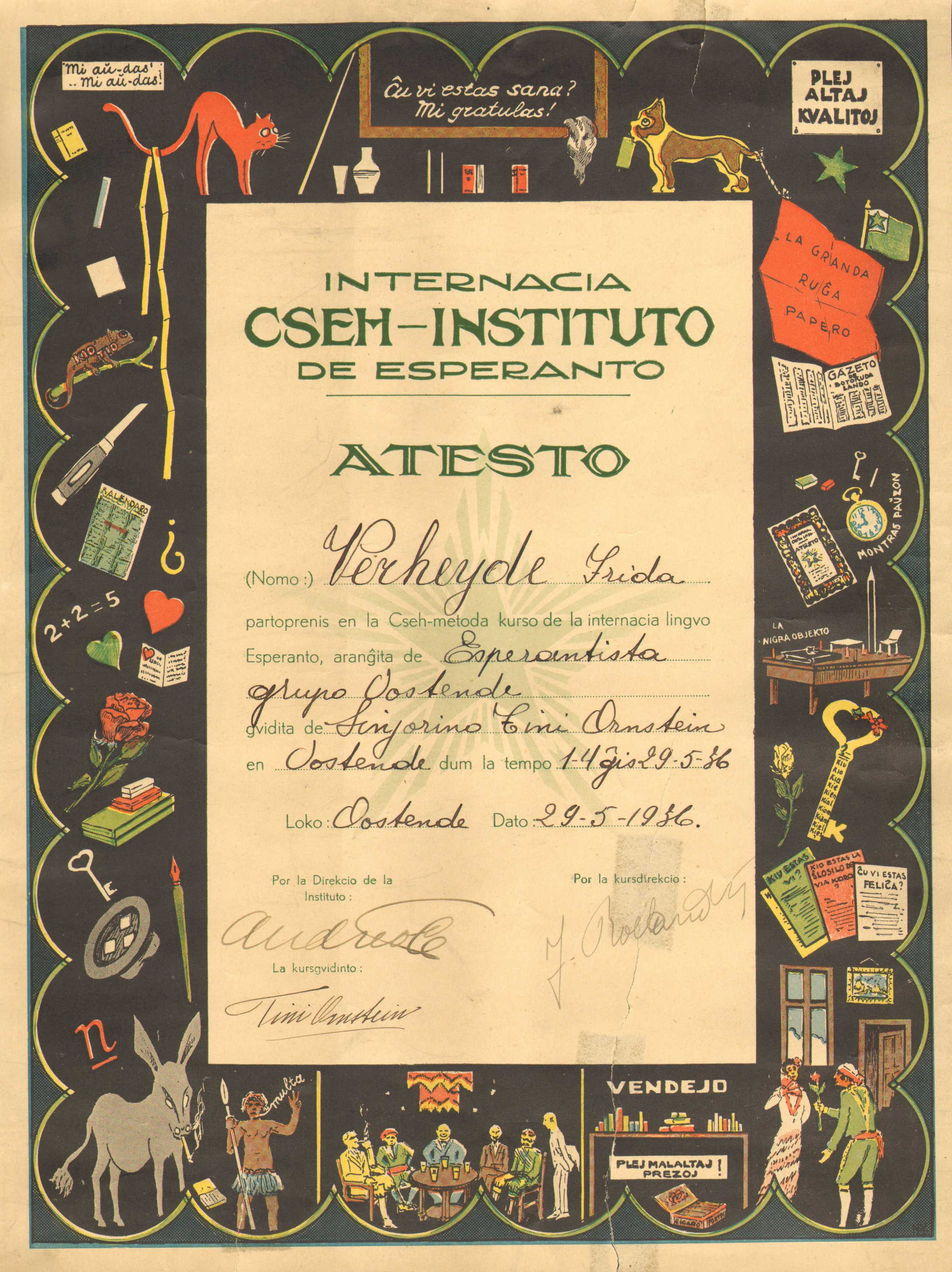 Attest waarbij bevestigd wordt dat Frida Verheyde uit Oostende in 1936 een Esperanto-cursus volgens de Cseh-methode gevolgd heeft die gegeven werd door mevrouw Tini Olstein. Een interview met Tini Olstein verscheen in het toeristisch tijdschrift 'De Kust', 1 april 1936 (in collectie 'Westflandrica' van de Provinciale Bibliotheek en Archief Brugge van de provincie West-Vlaanderen).